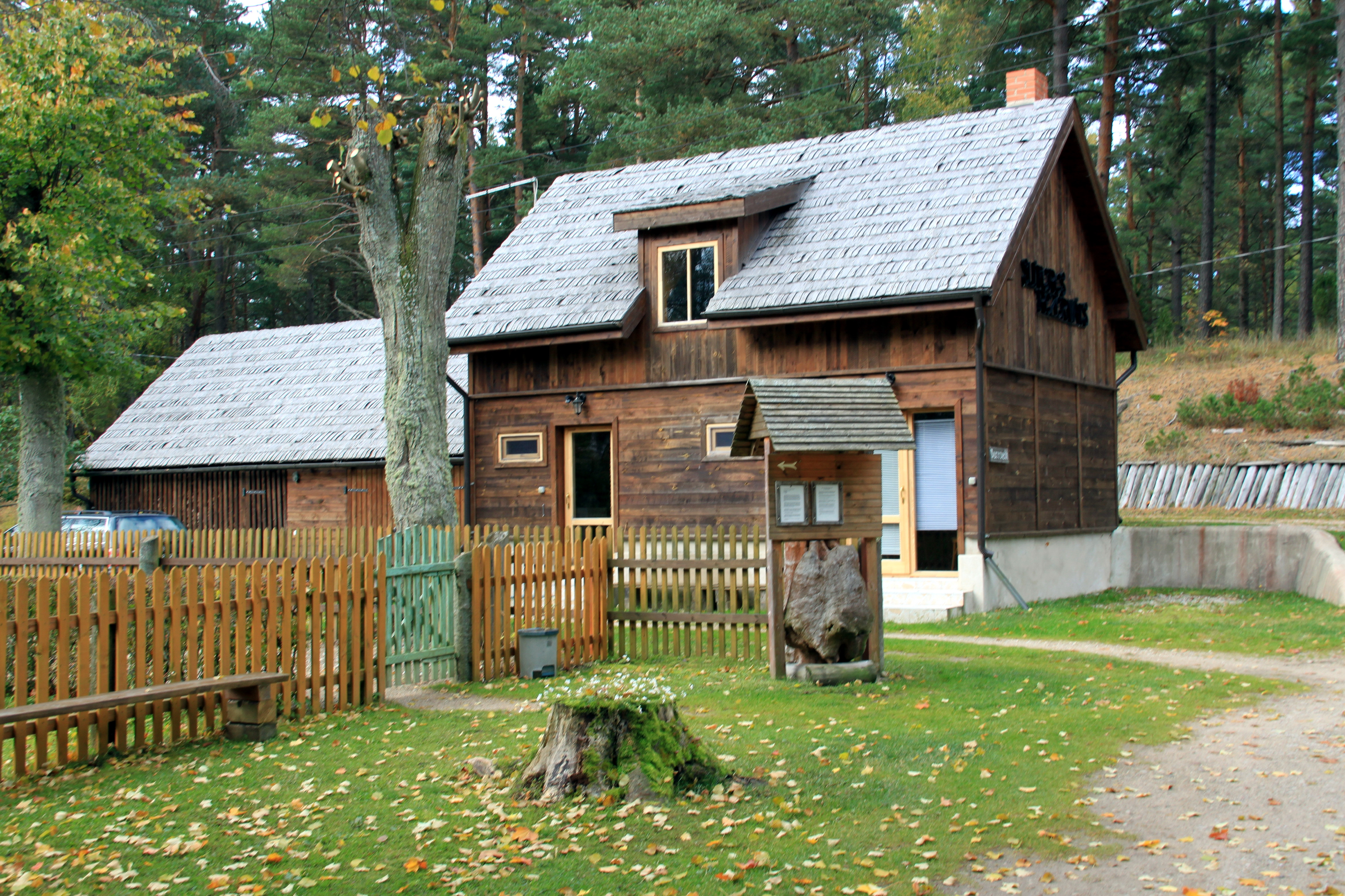 Vaides ragu muzejs